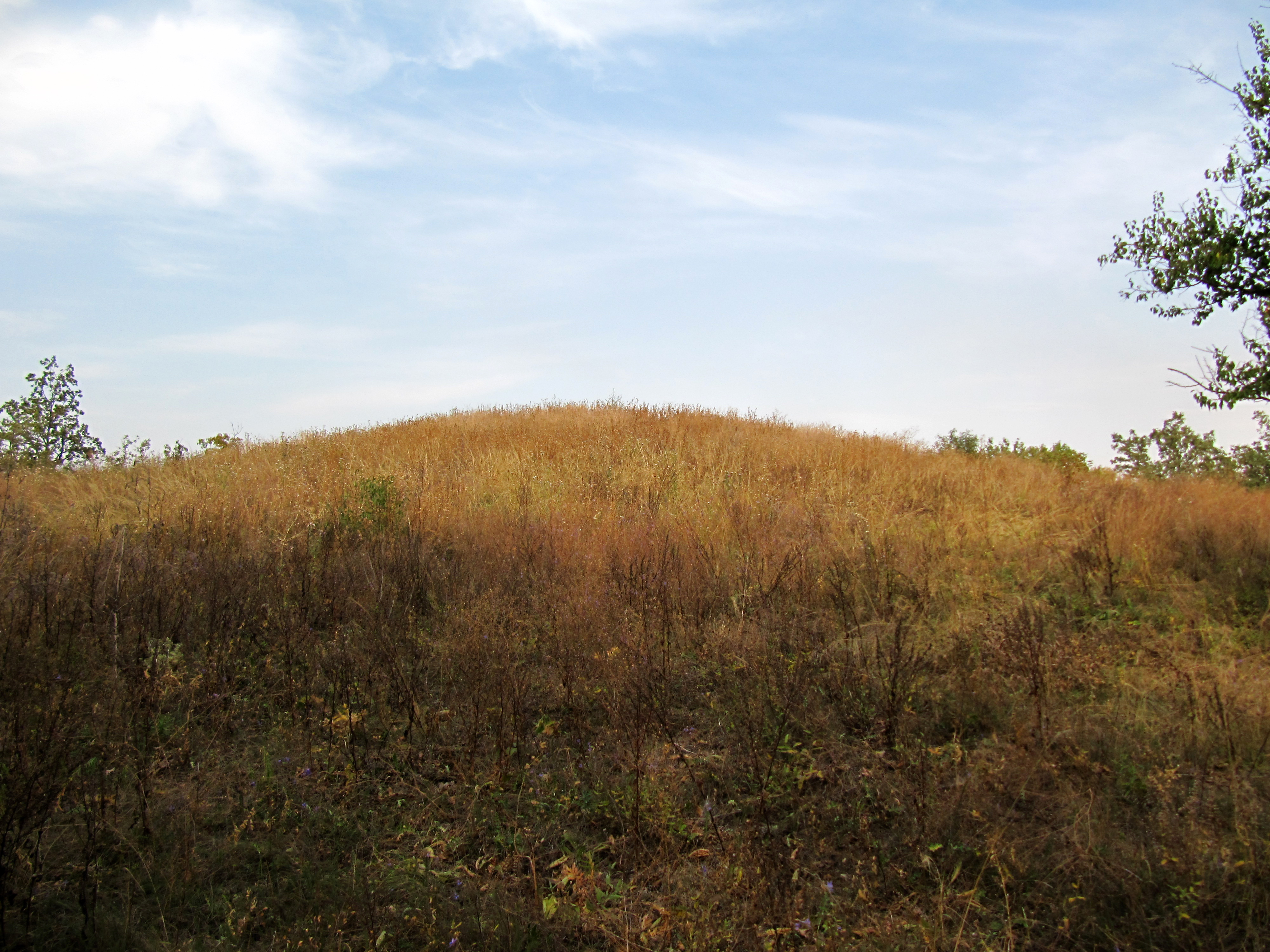 Курганний могильник “Ляхова могила” (6 курганів, найбільший h=9м, d=162м), Мусіївка, 2,5 км на північний схід від центру села; на території державного лісового фонду; 0,3 км на захід від межі території м. Кривий Ріг; розташовані ланцюжком зі сходу до заходу протягом 0,25 км, злиті полами; 0,01 км на захід від пам’ятки археології «Святилище»; 0,25 км на північ від траси Миколаївське шосе